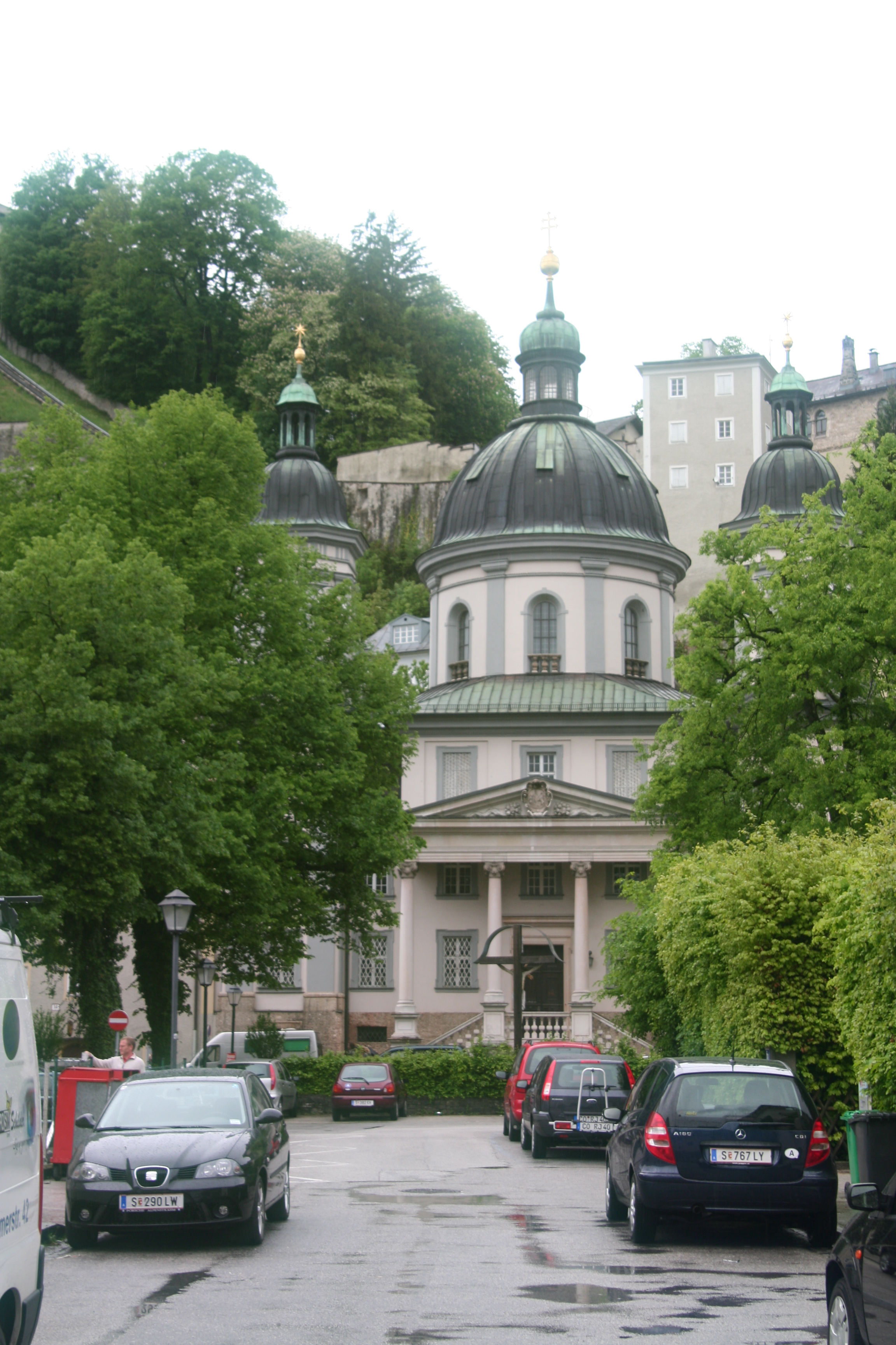 Erhardkirche